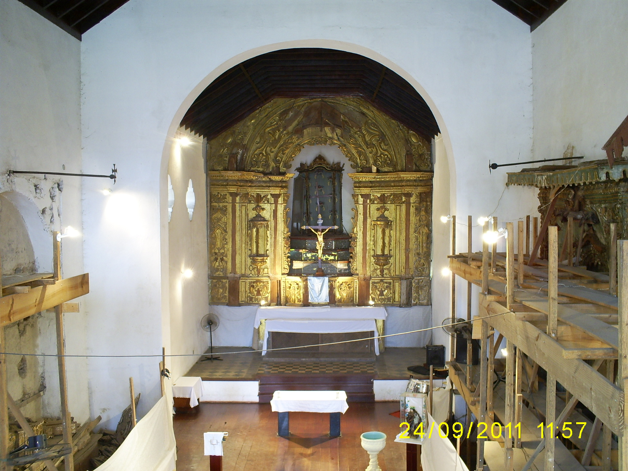 Igreja Matriz de Nossa Senhora do Pilar